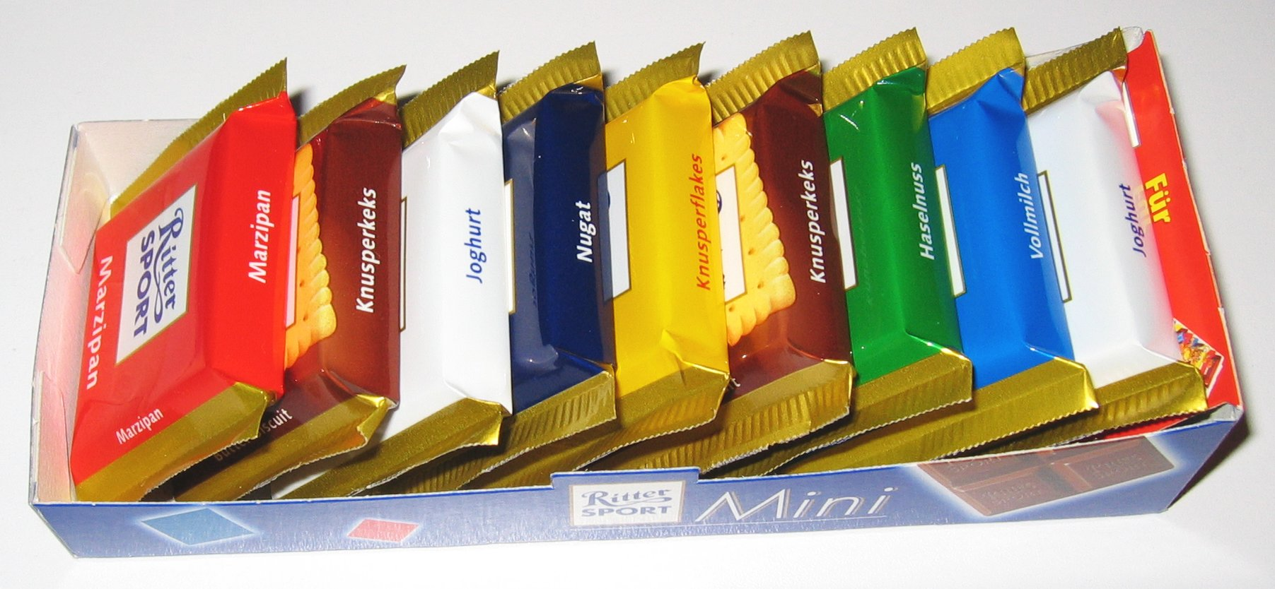 Ritter Sport Minis, 2006